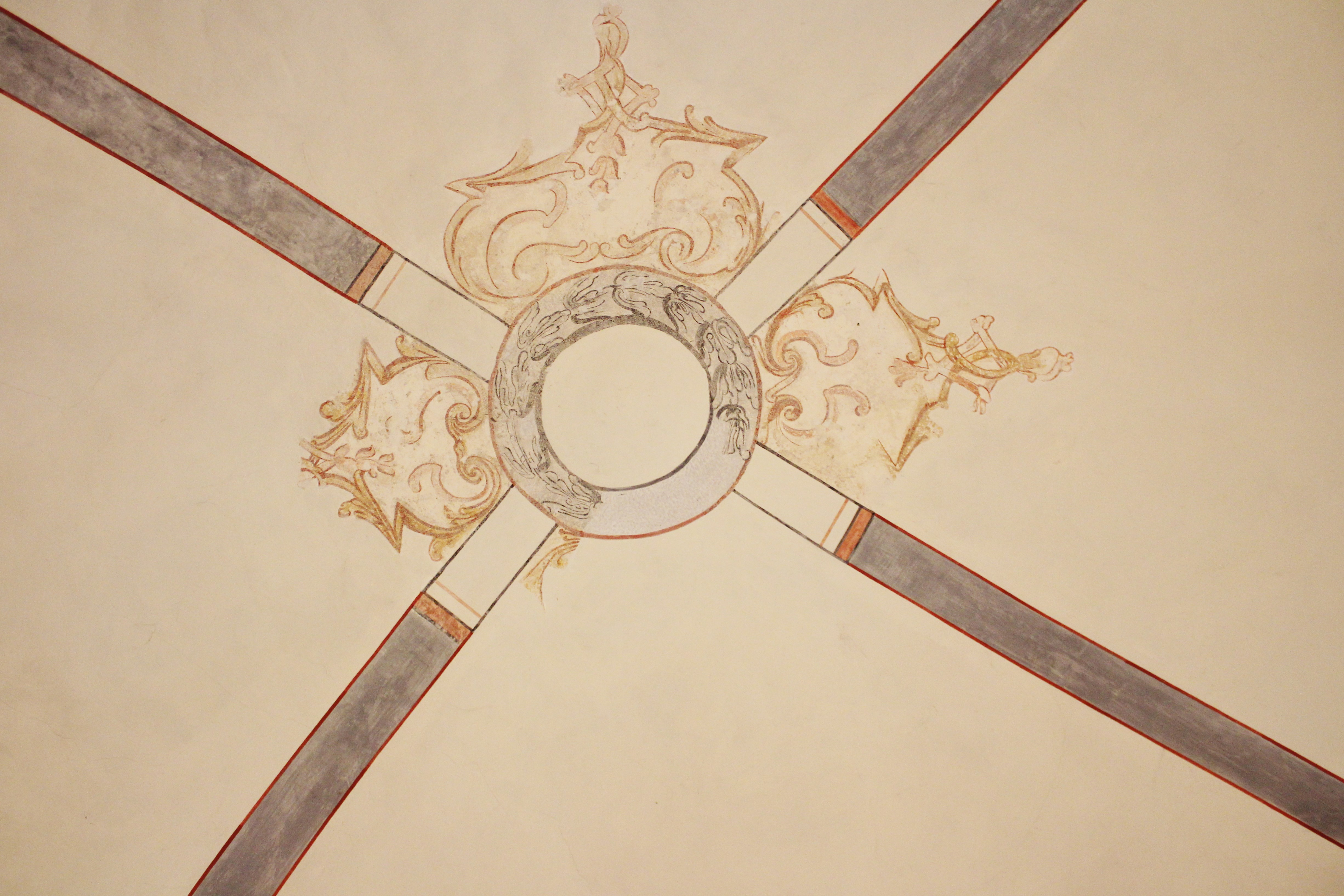 Evangelische Kirche Leun, Lahn-Dill-Kreis, Hessen, Deutschland